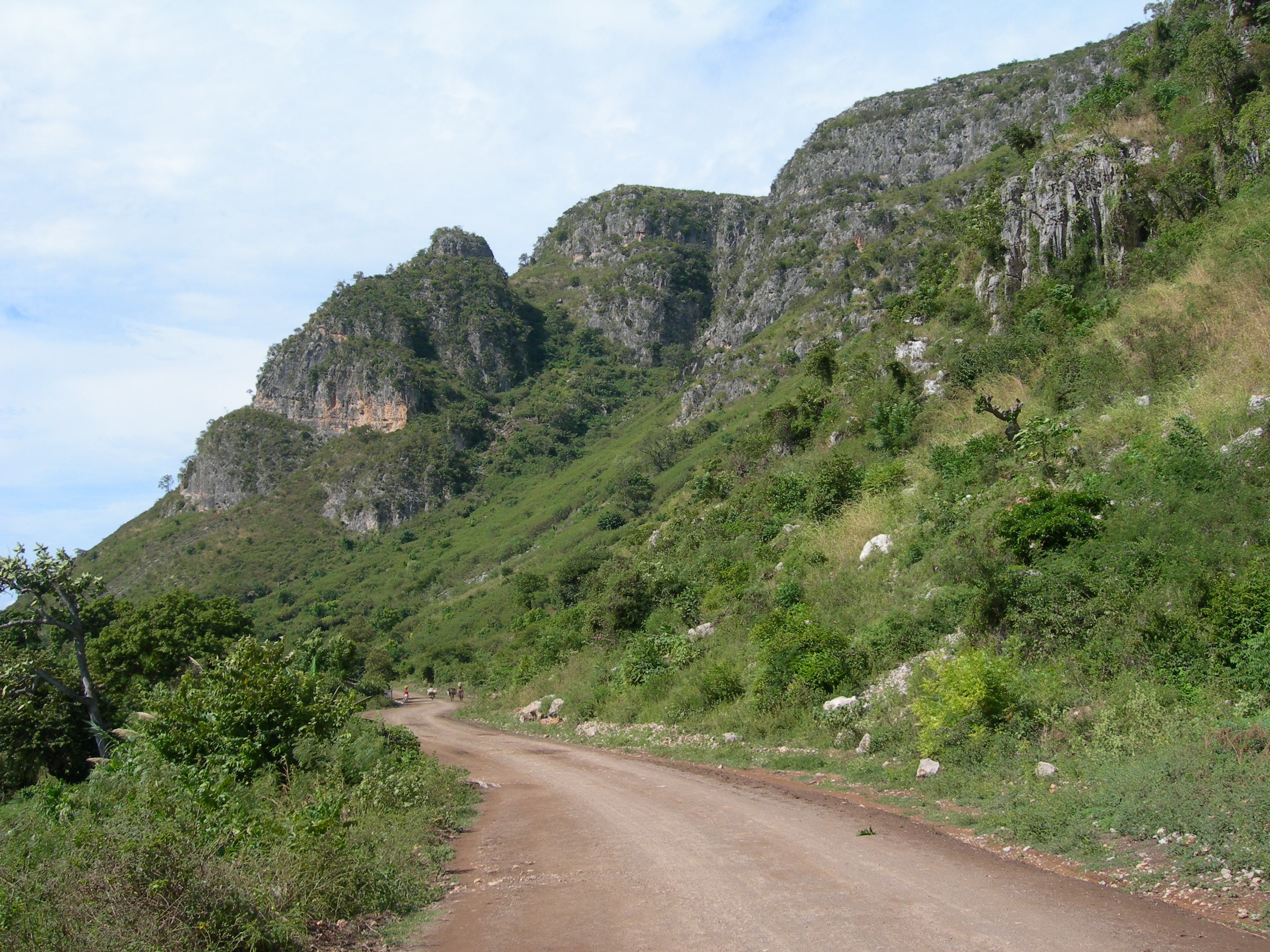 Le long de la rivière Coupe-à-l'Inde, près de Dessalines